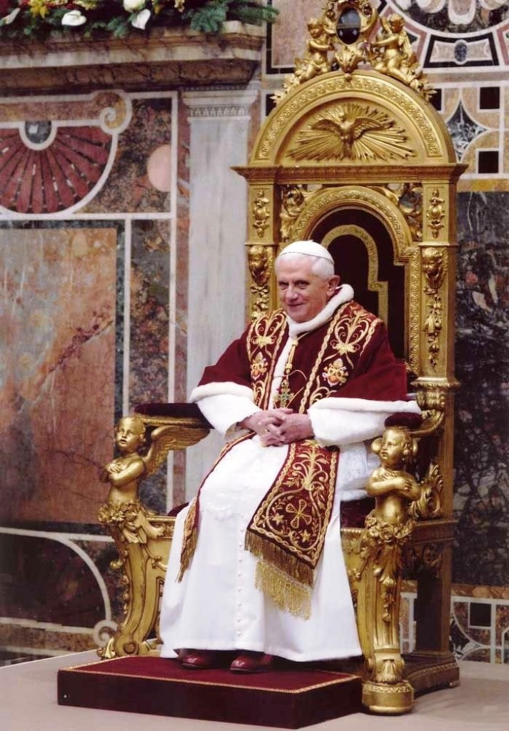 Chụp cận cảnh Đức Giáo Hoàng Benedict XVI trên ngai tòa nhỏ tại Dinh Tông Tòa (Apostolic Palace), Vatican.